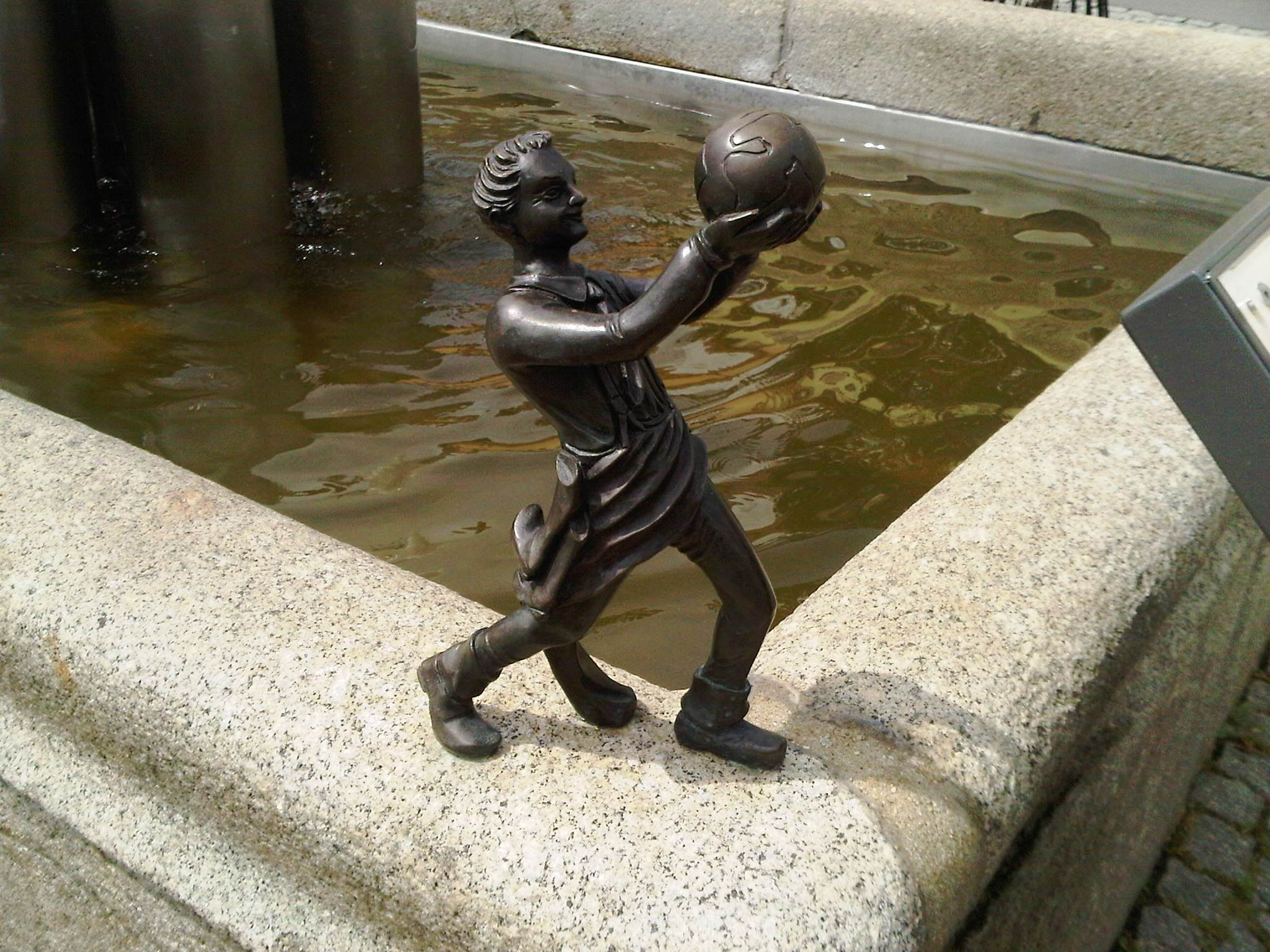 Schusterjunge am Springbrunnen in Calau, Kleinstadt im Landkreis Oberspreewald-Lausitz in Brandenburg